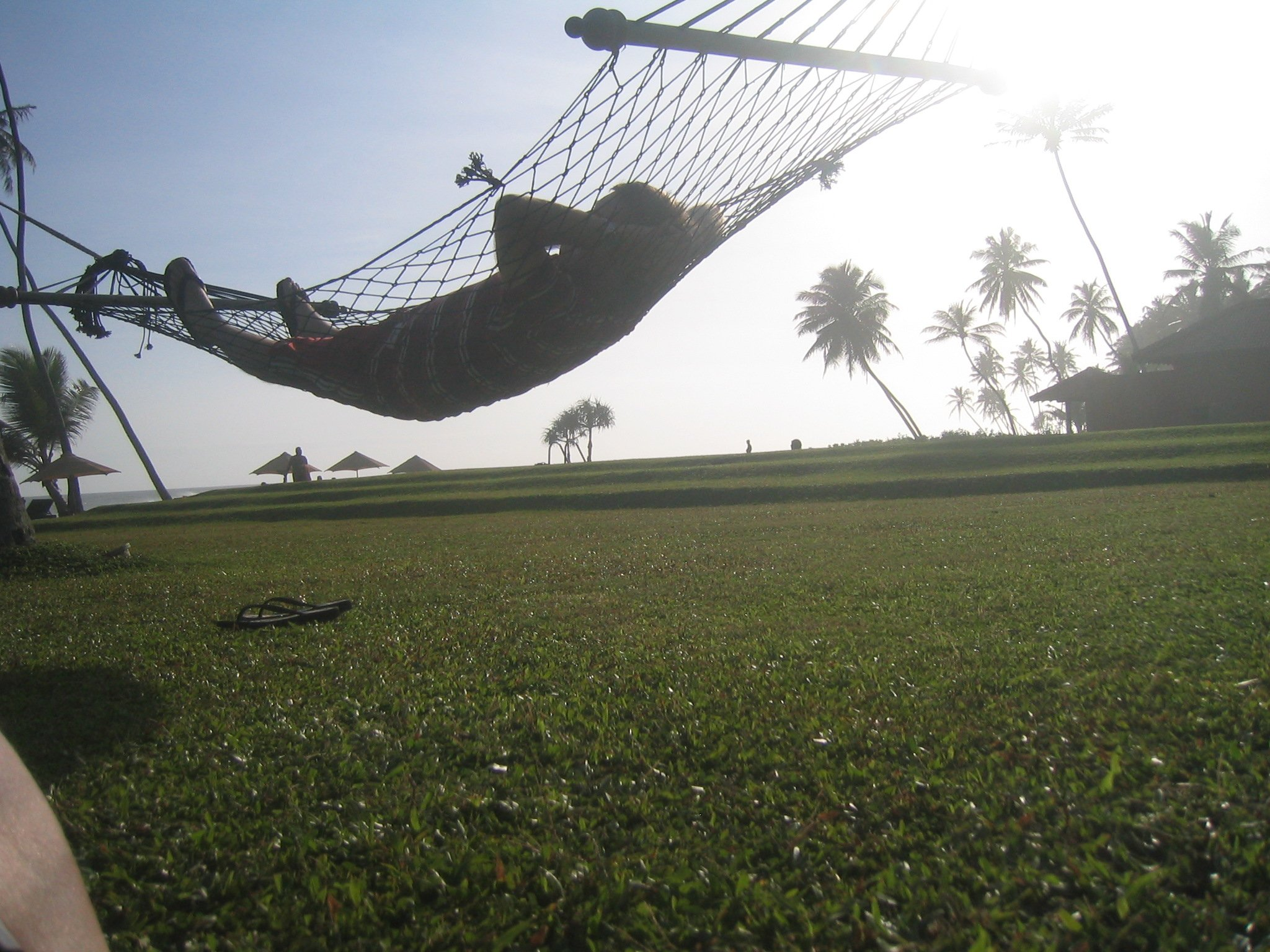 in Galla, Sri Lanka